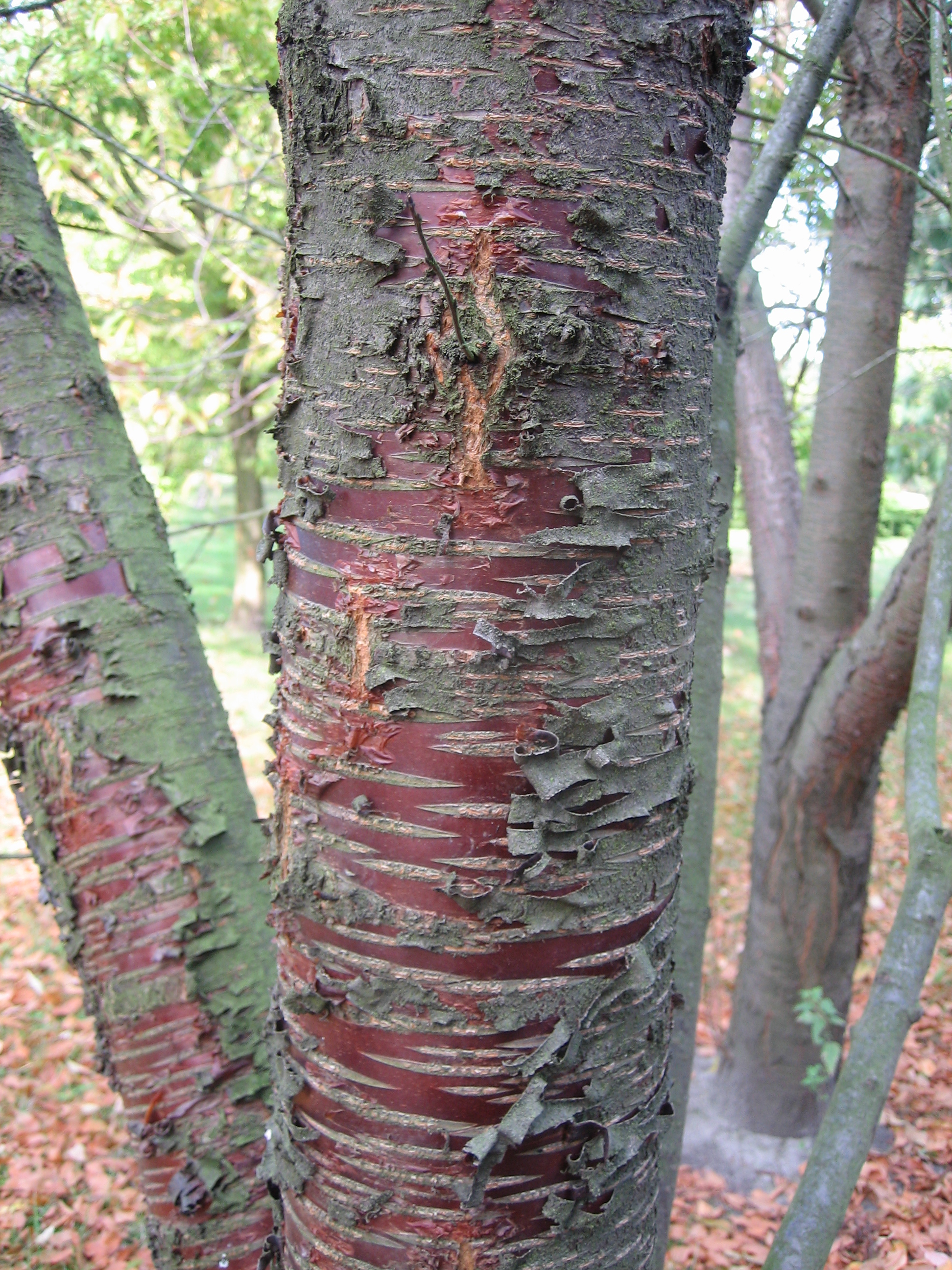 Prunus maackii/bark